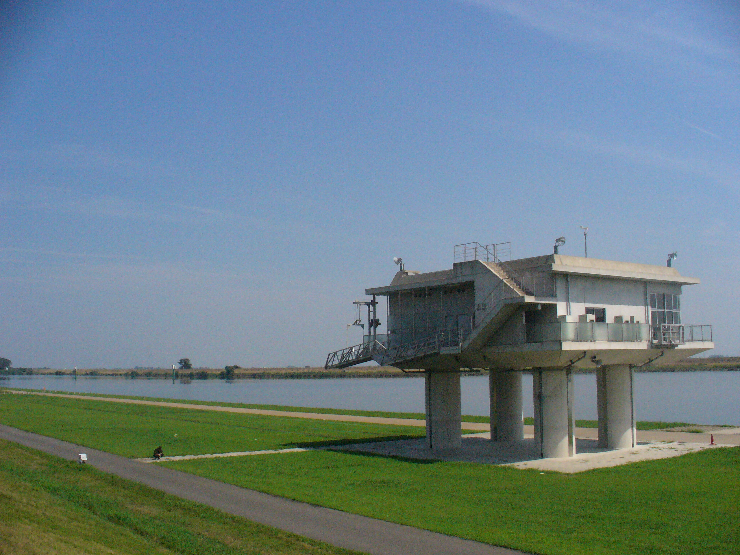 Nagaragawa International Regatta Course（長良川国際レガッタコース）,Kaizu,Gifu,Japan（岐阜県海津市）で撮影。